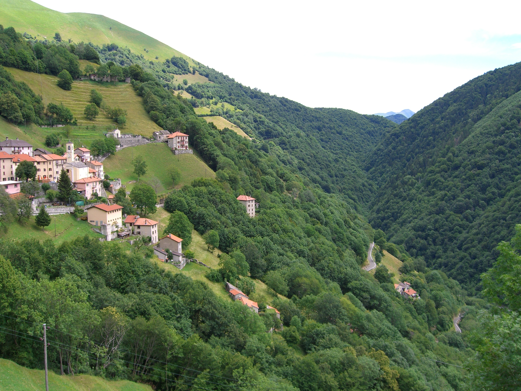 CIMG0896